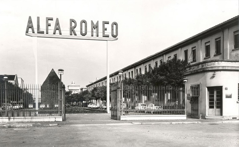 L'ingresso dello stabilimento Alfa Romeo del Portello di via Gattamelata